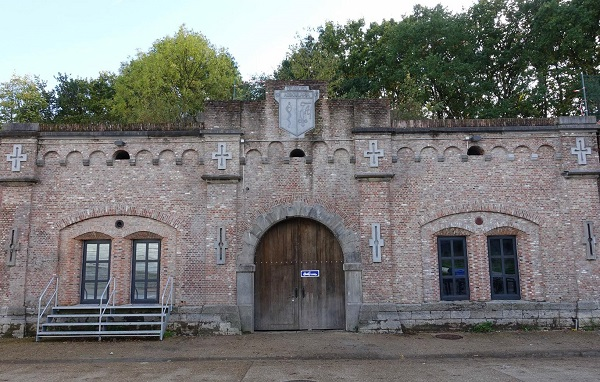 Het hoofdfrontgebouw (gebruikt als feestzaal) van Fort VI.